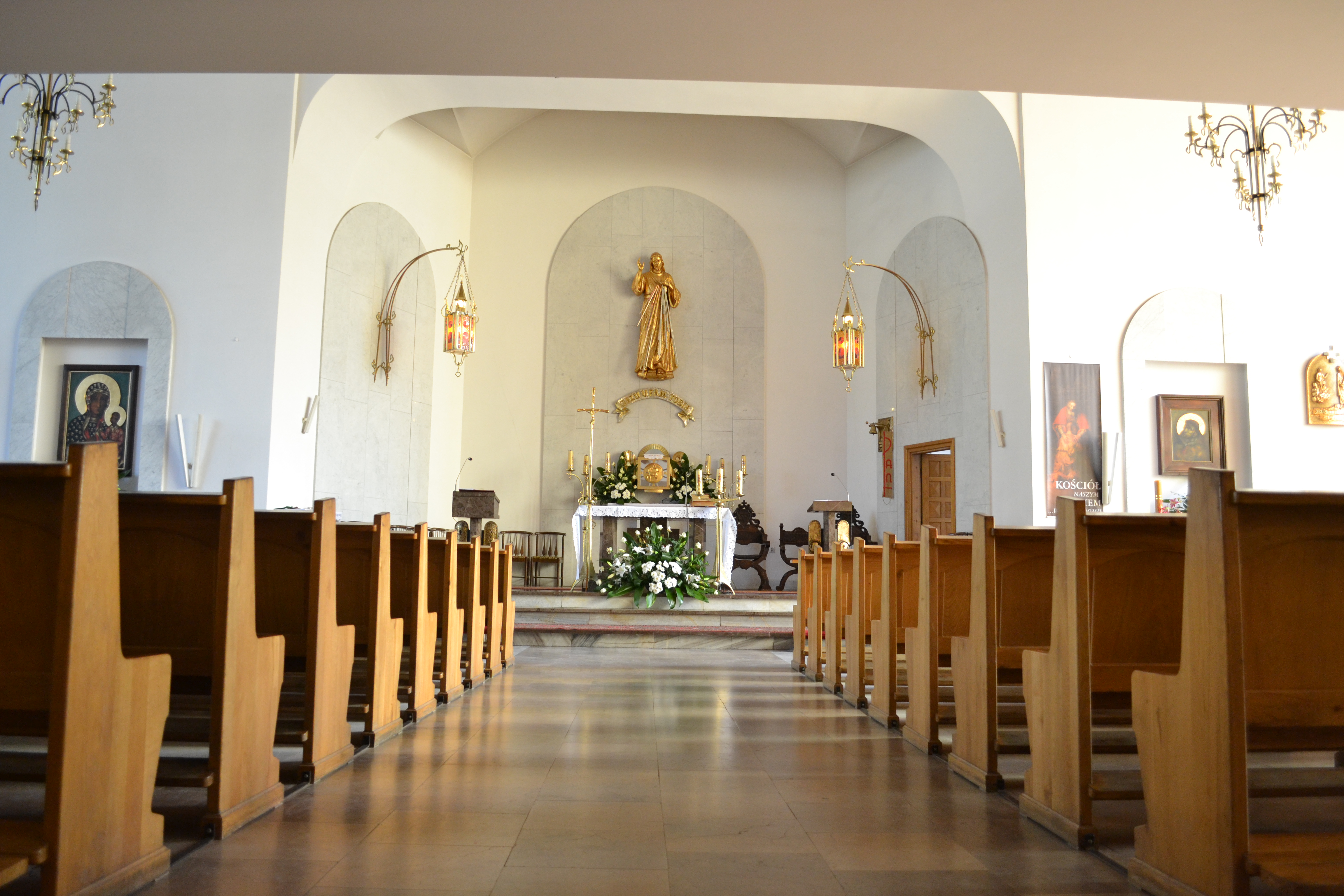 Gorzów Wielkopolski - kościół parafialny p.w. św. Antoniego z Padwy i Stanisława Kostki